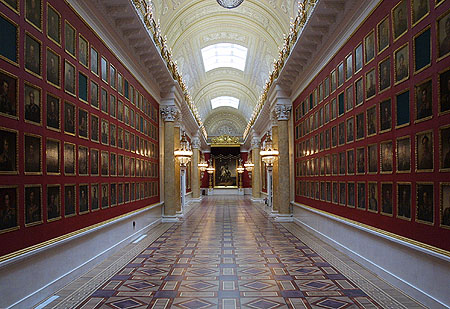 Ermitage Corridor